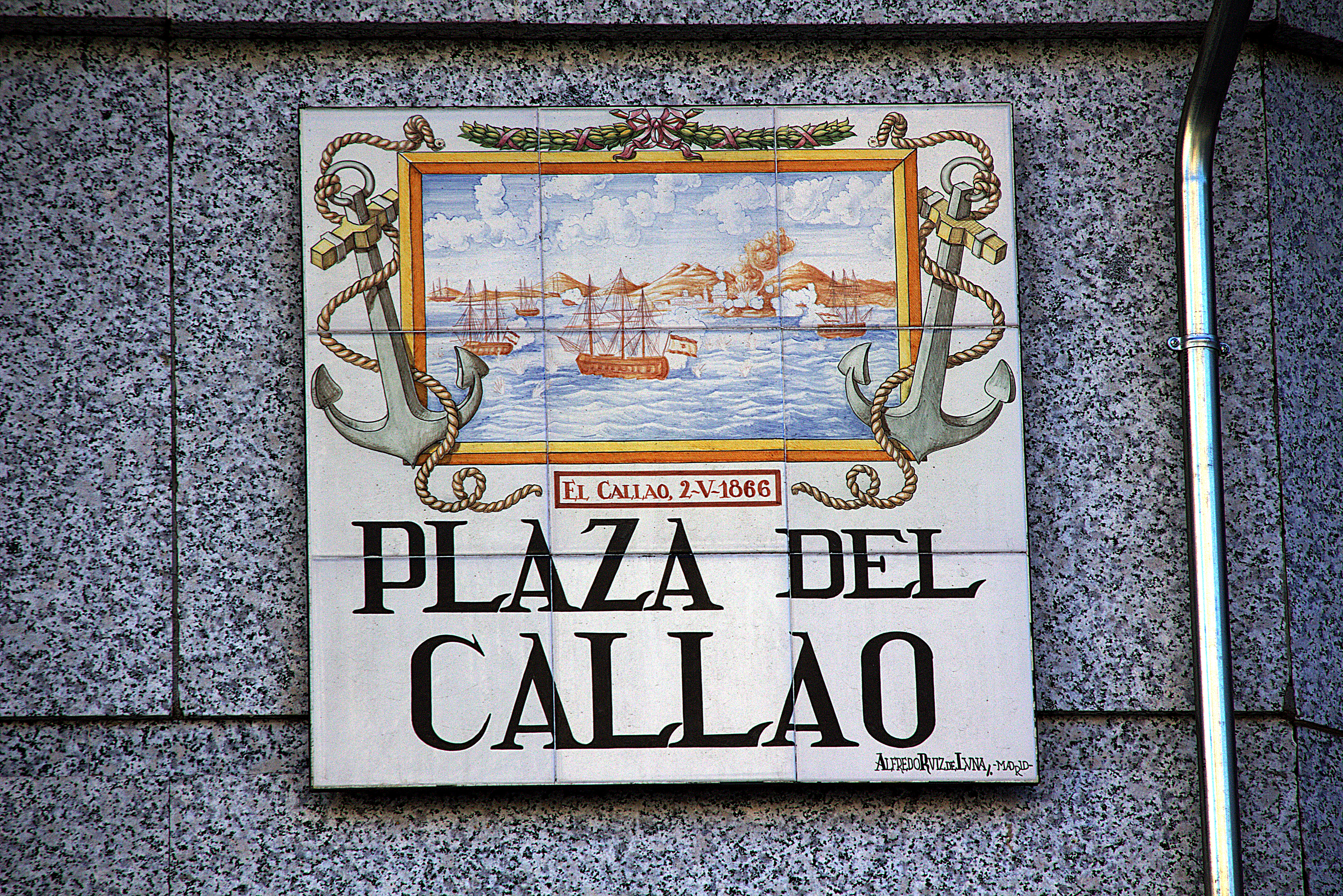 Placa de la plaza del Callao, en Madrid (España)